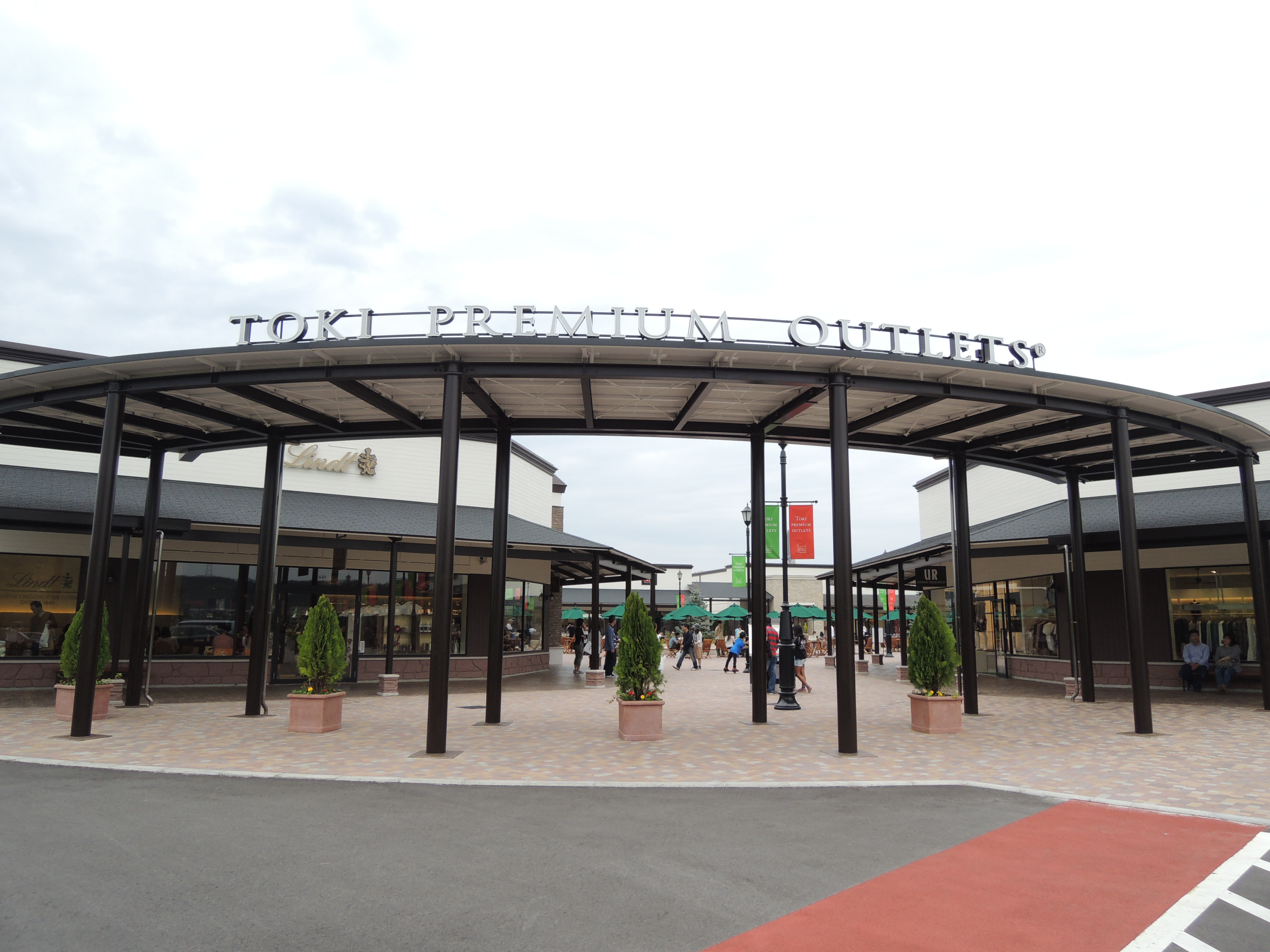 土岐プレミアム・アウトレット 入口（左側店舗はリンツ、右側店舗はアーバンリサーチ）